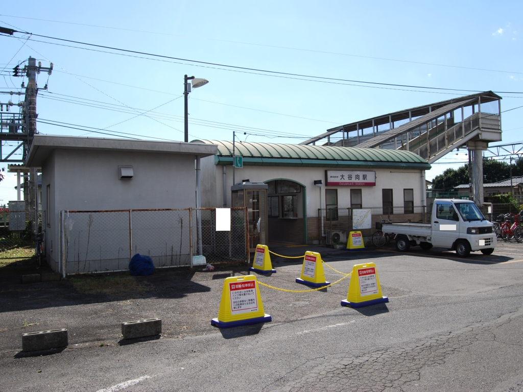 東武鉄道鬼怒川線大谷向駅駅舎全景（2008/10/28撮影）